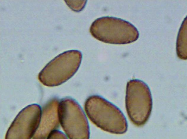 Cortinarius violaceus spores in melzer's